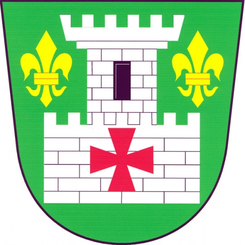 znak, Jamolice, okres Znojmo